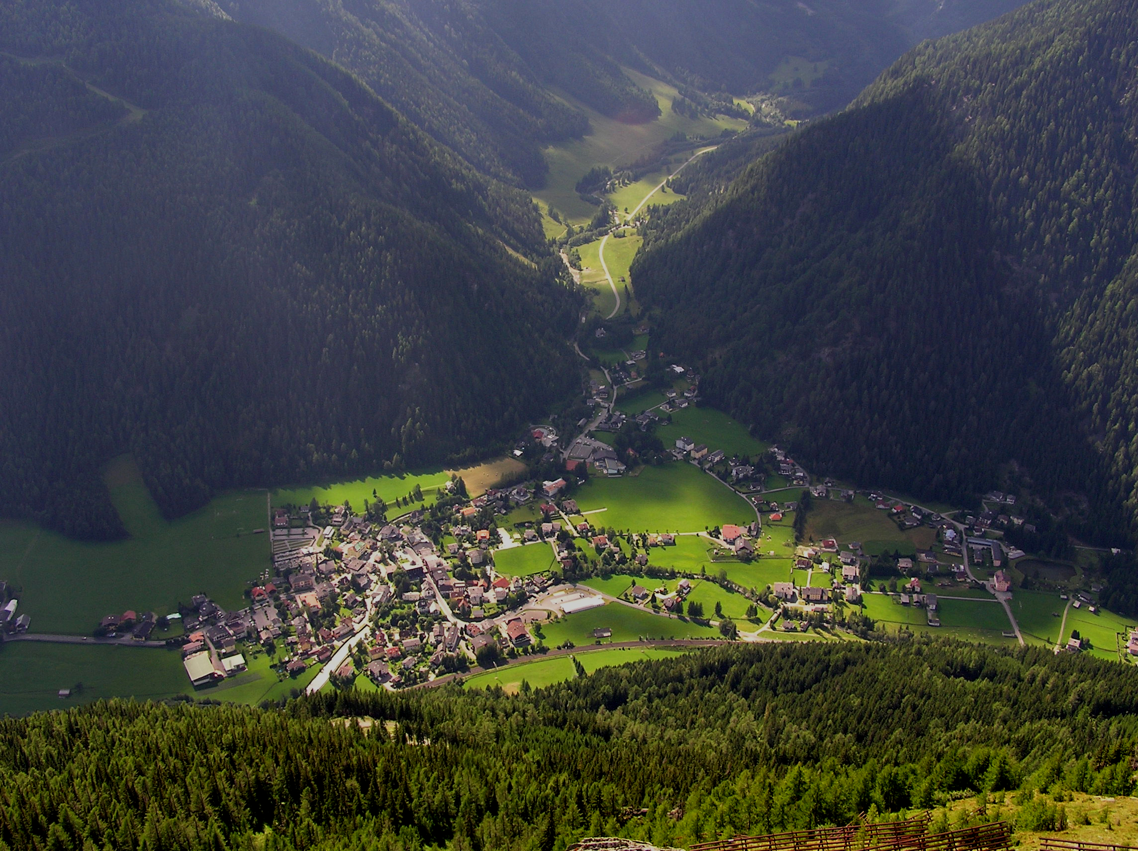 Blick auf Ortskern von Mallnitz und Tauerntal vom Auernig (2130m)